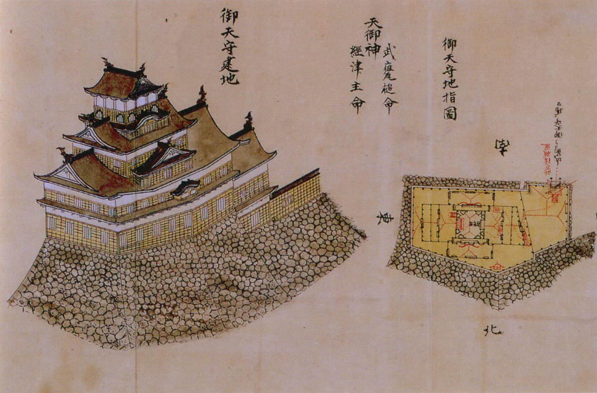 牙城郭櫓実測図